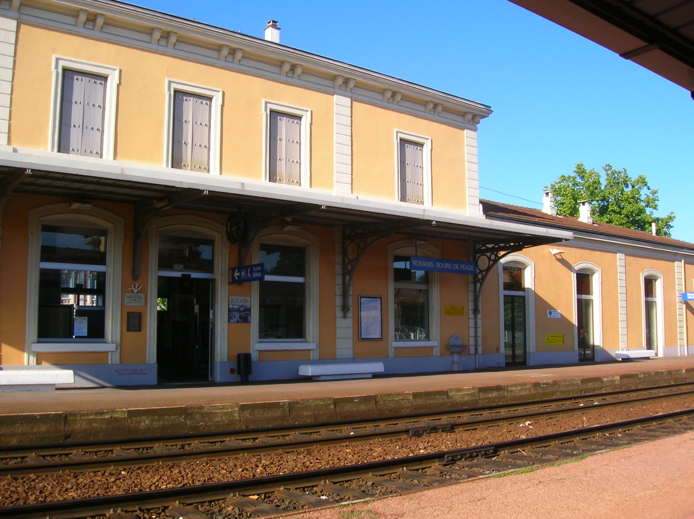 Les quais et le bâtiment principal de la gare de Romans-Bourg-de-Péage.